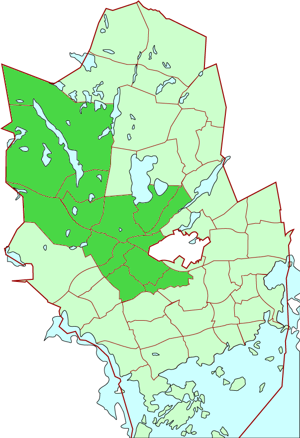 Vanha-Espoo/Gamla Esbo district in Espoo city, Finland